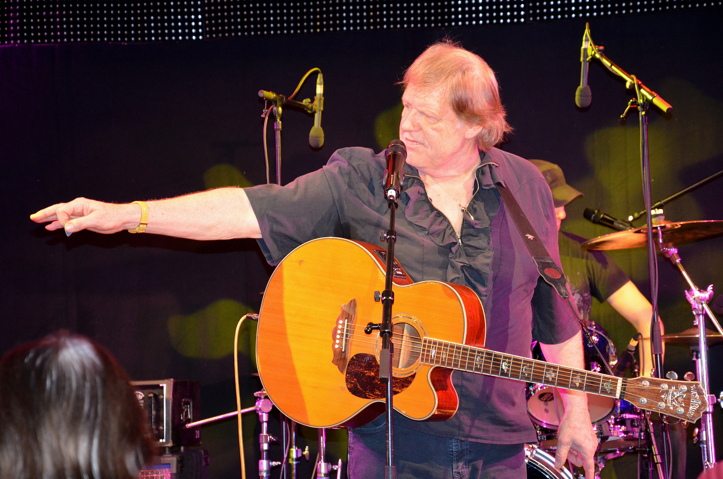 Wie alle Künstler für das Fest Die!!! Weihnachtsfeier für Obdachlose und Bedürftige in Hannover arbeitete auch der Musiker Gunter Gabriel an diesem Tag unentgeltlich für die - erwachsenen - Gäste - doch er war nicht alleine angereist ...